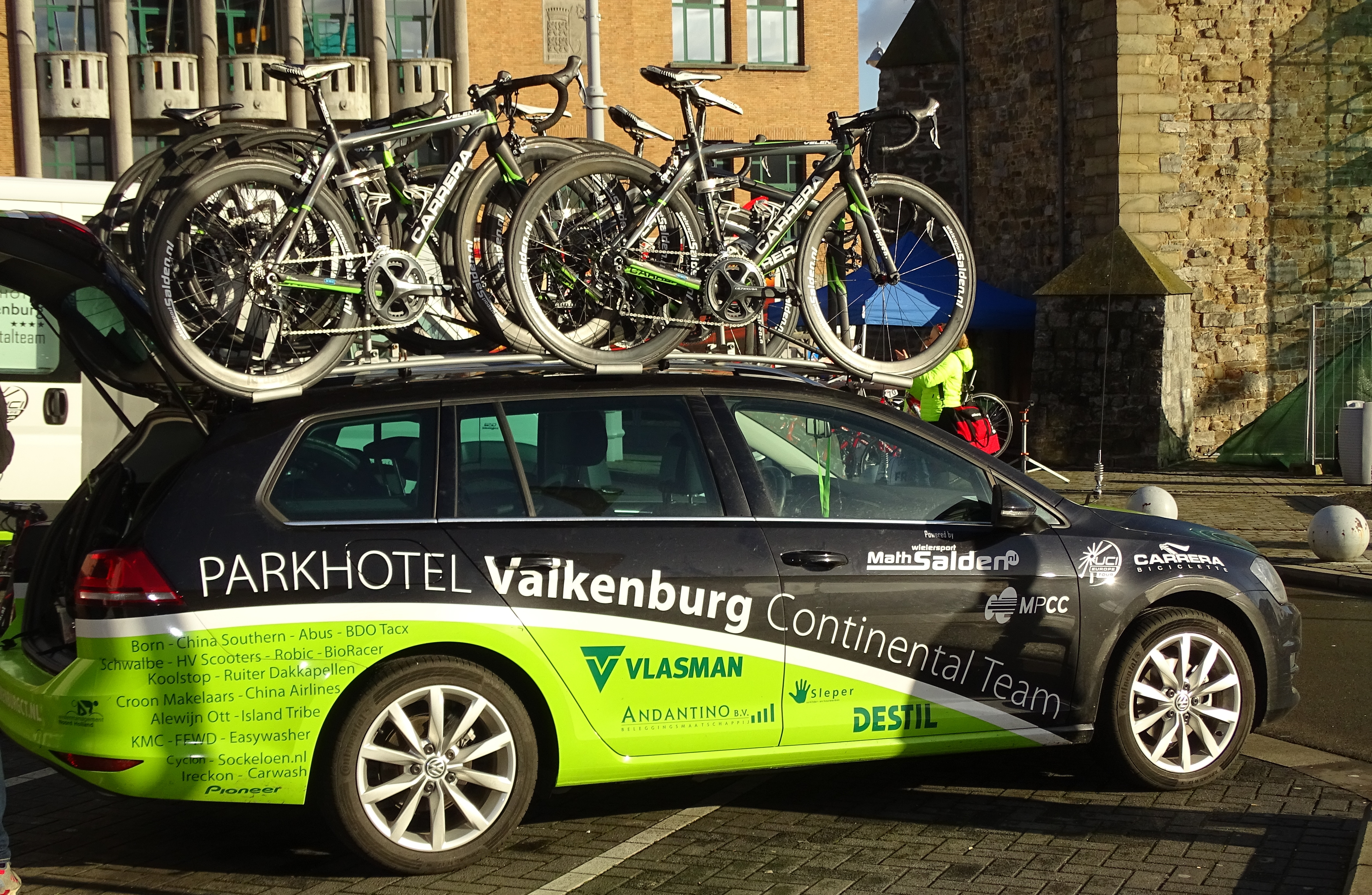 Reportage réalisé le mercredi 2 mars à l'occasion du départ du Samyn des Dames 2016 et du Samyn 2016 à Quaregnon, Belgique.